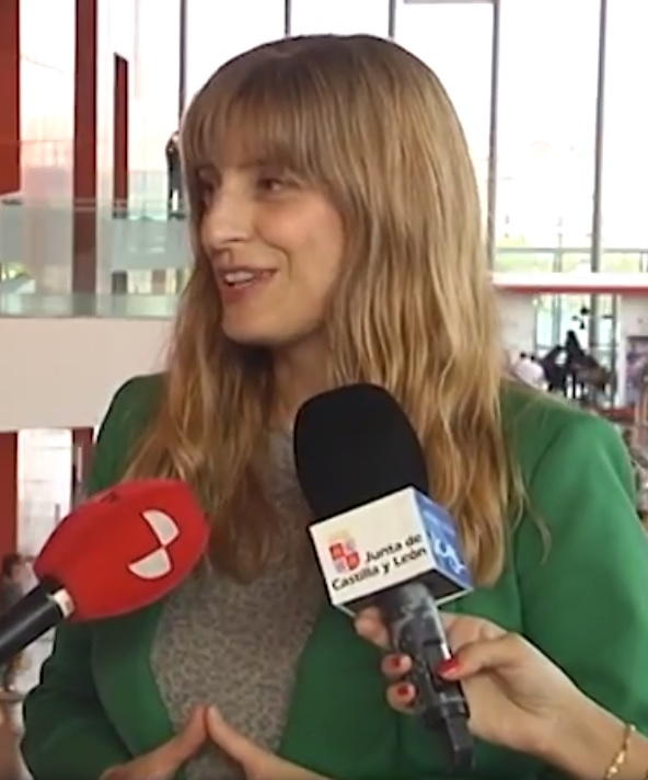 Mar Sancho en 2017